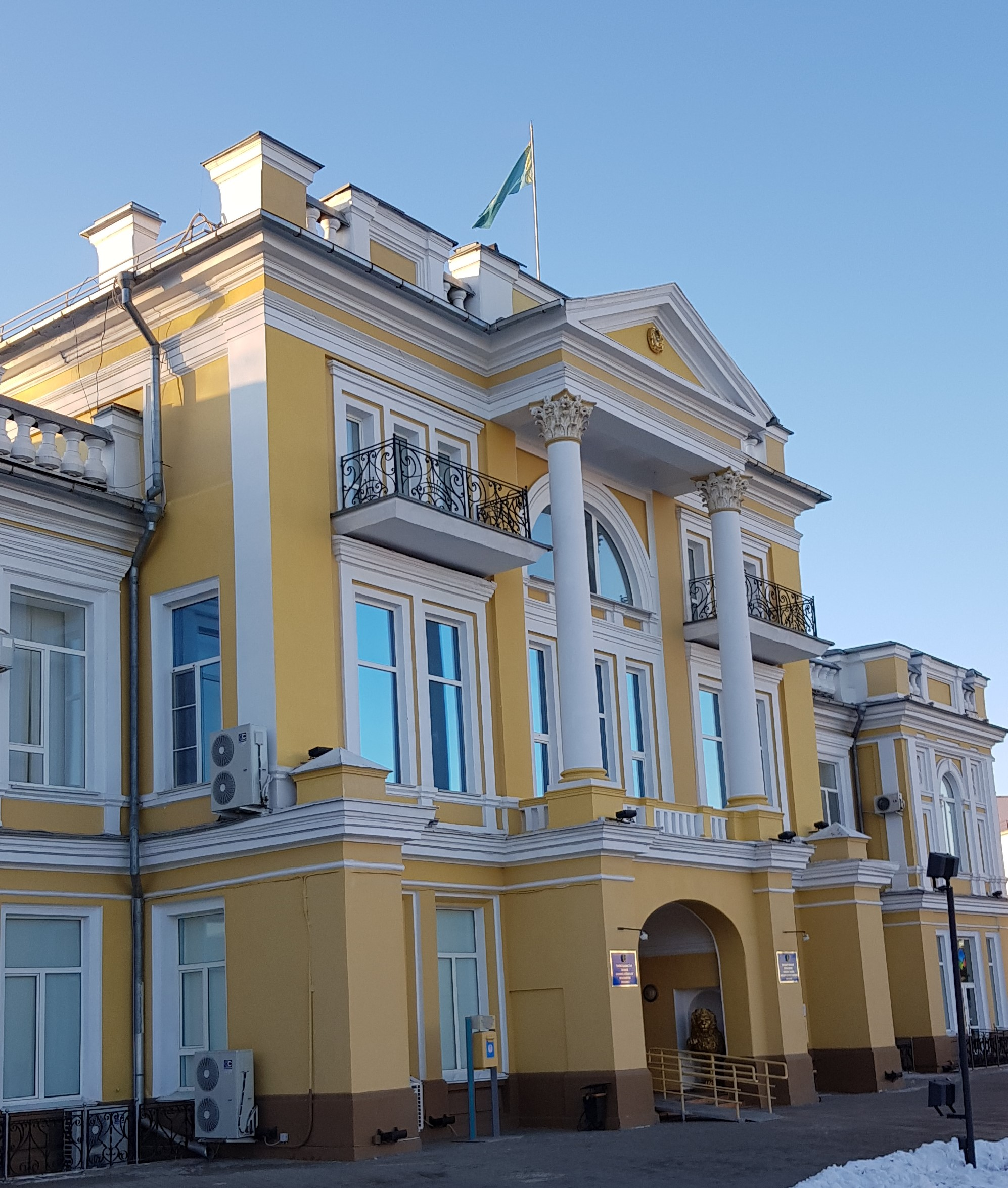 Центральный ризалит здания Торгово-промышленного банка в Уральске, архитектор Раевский, 1905 год